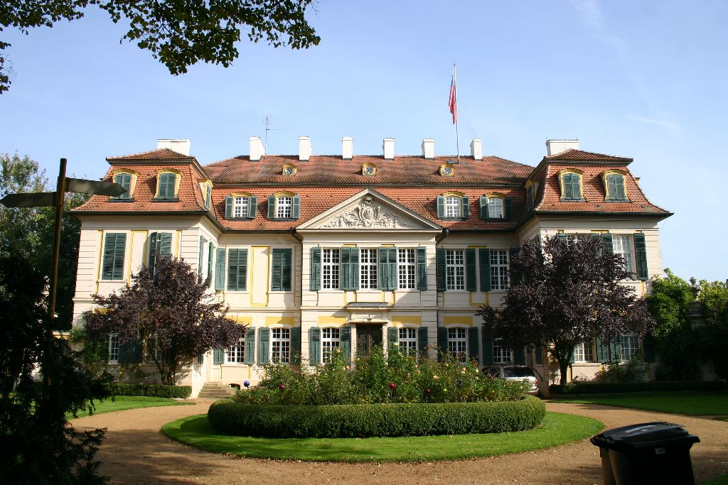 Schloss Dennenlohe